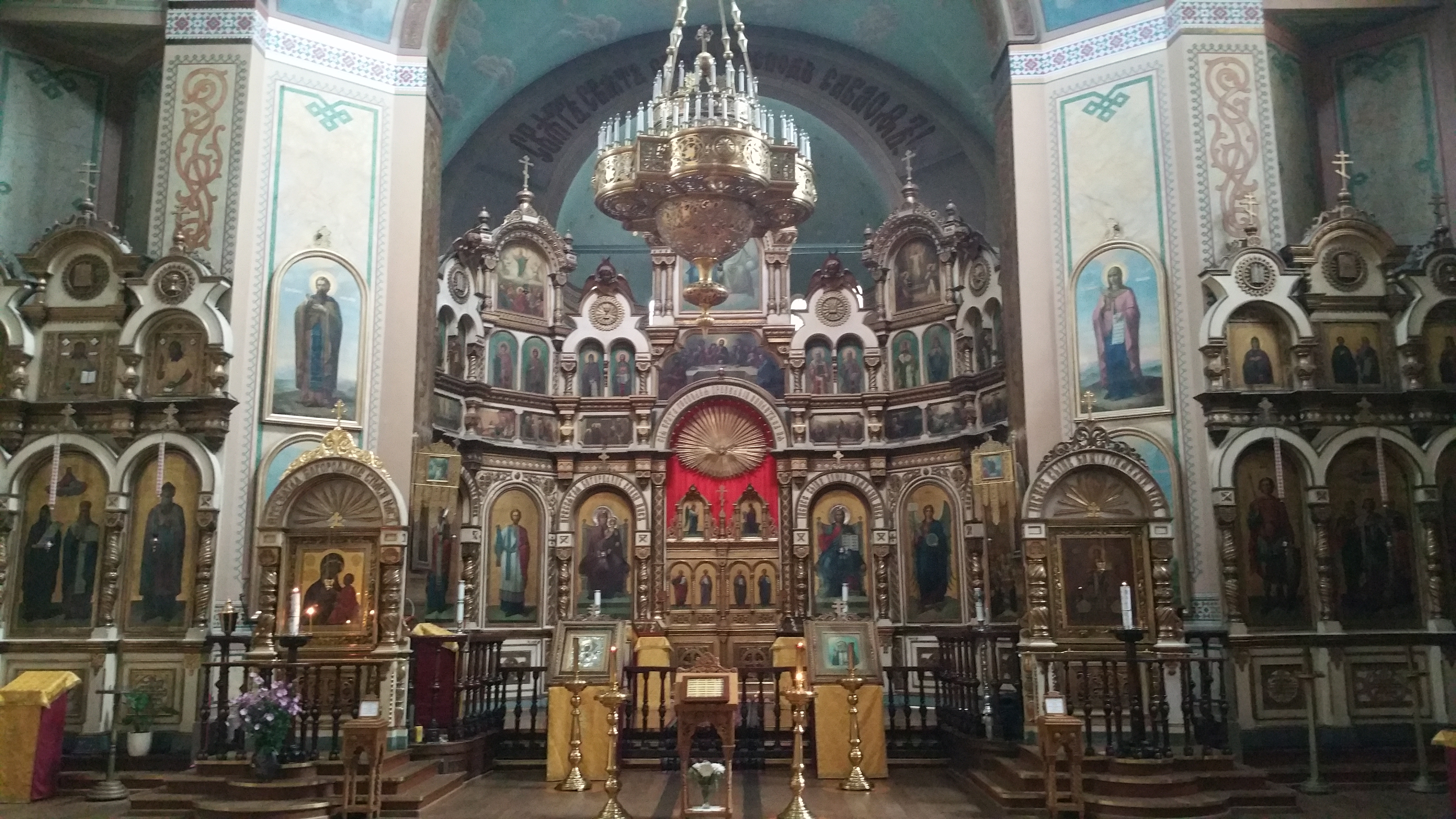 Inneres der Allerheiligenkirche in Riga